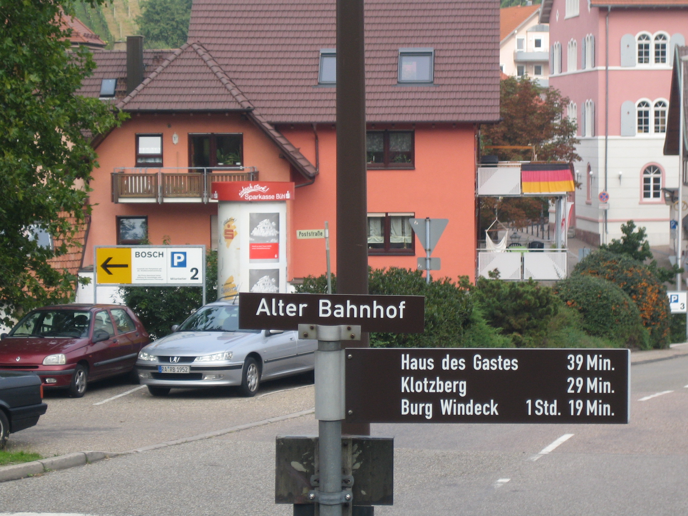 Schild mit dem Hinweis auf den früheren Bhf. mit Blick auf das Ortszentrum von Bühlertal-Untertal